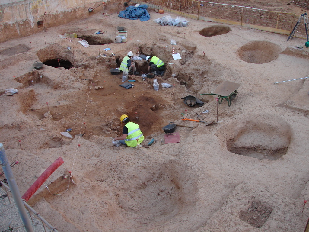 Intervenció arqueològica als carrers Reina Amàlia, Lleialtat i Carretes